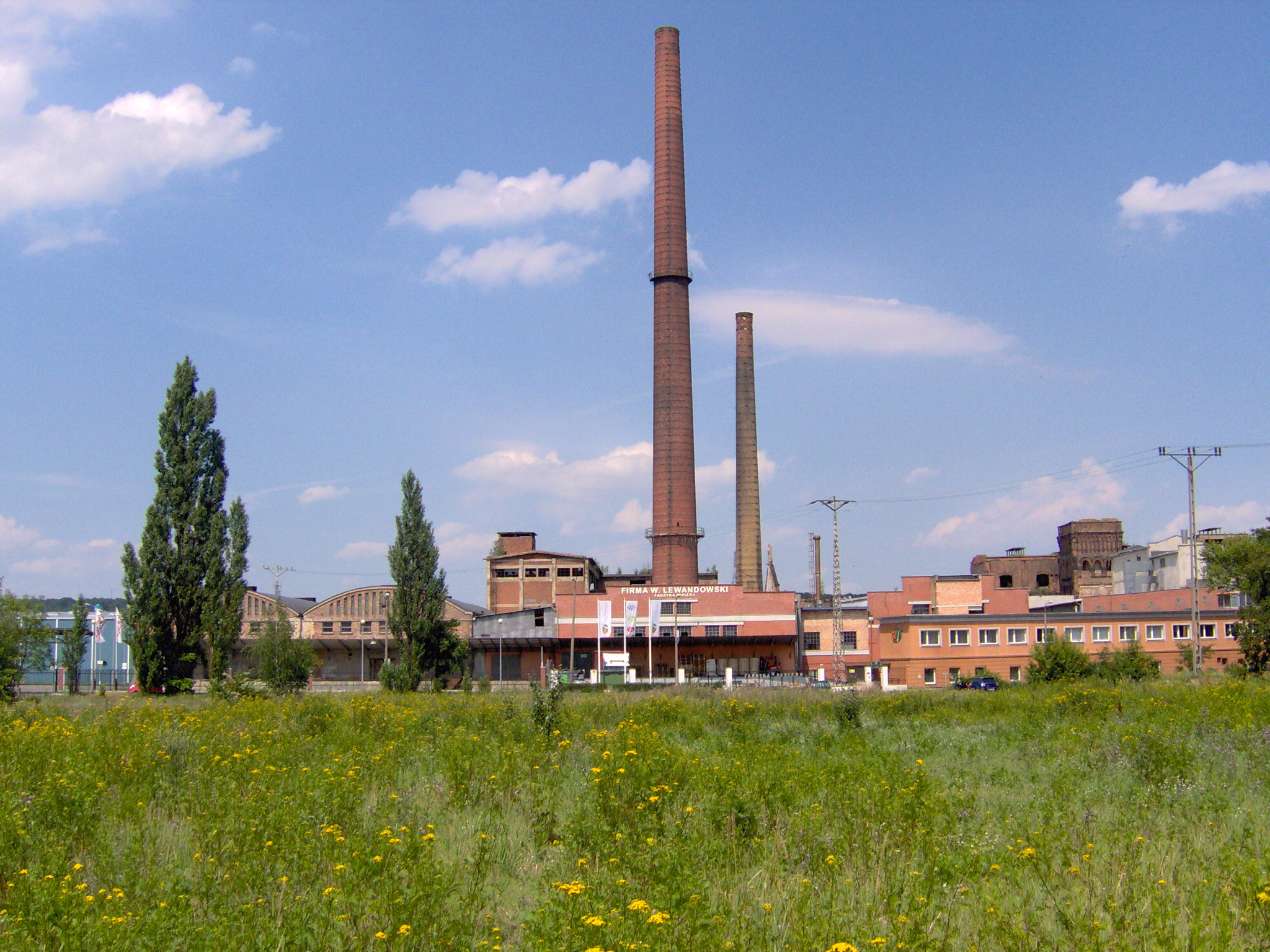 Pozostałości po celulozie (2009 r.)